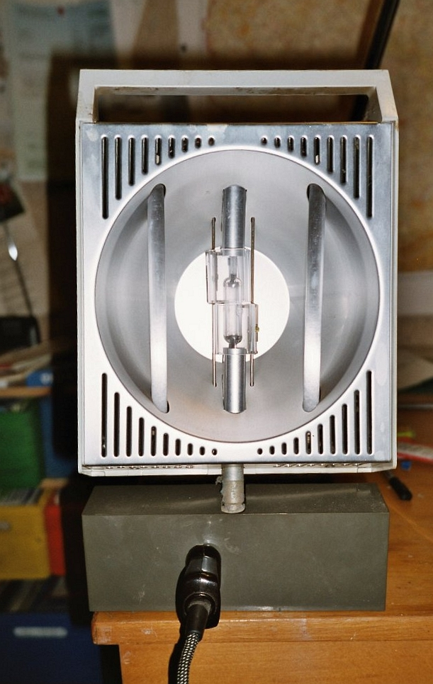 Bild einer Höhensonne.